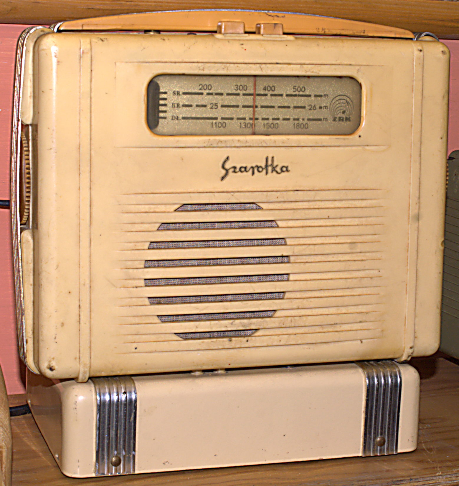 Szarotka